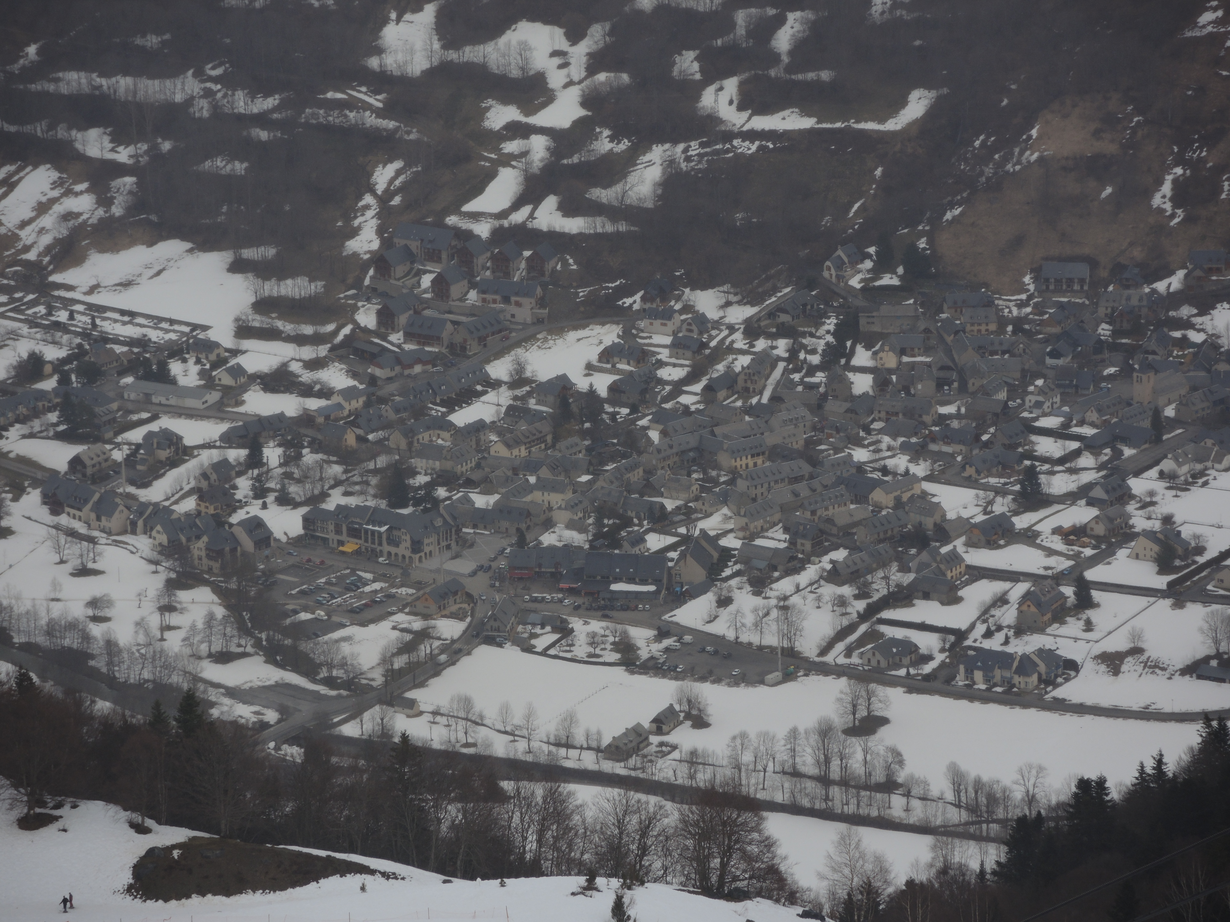 Vue aérienne de Loudenvielle.